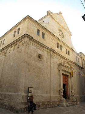 Facciata del Duomo